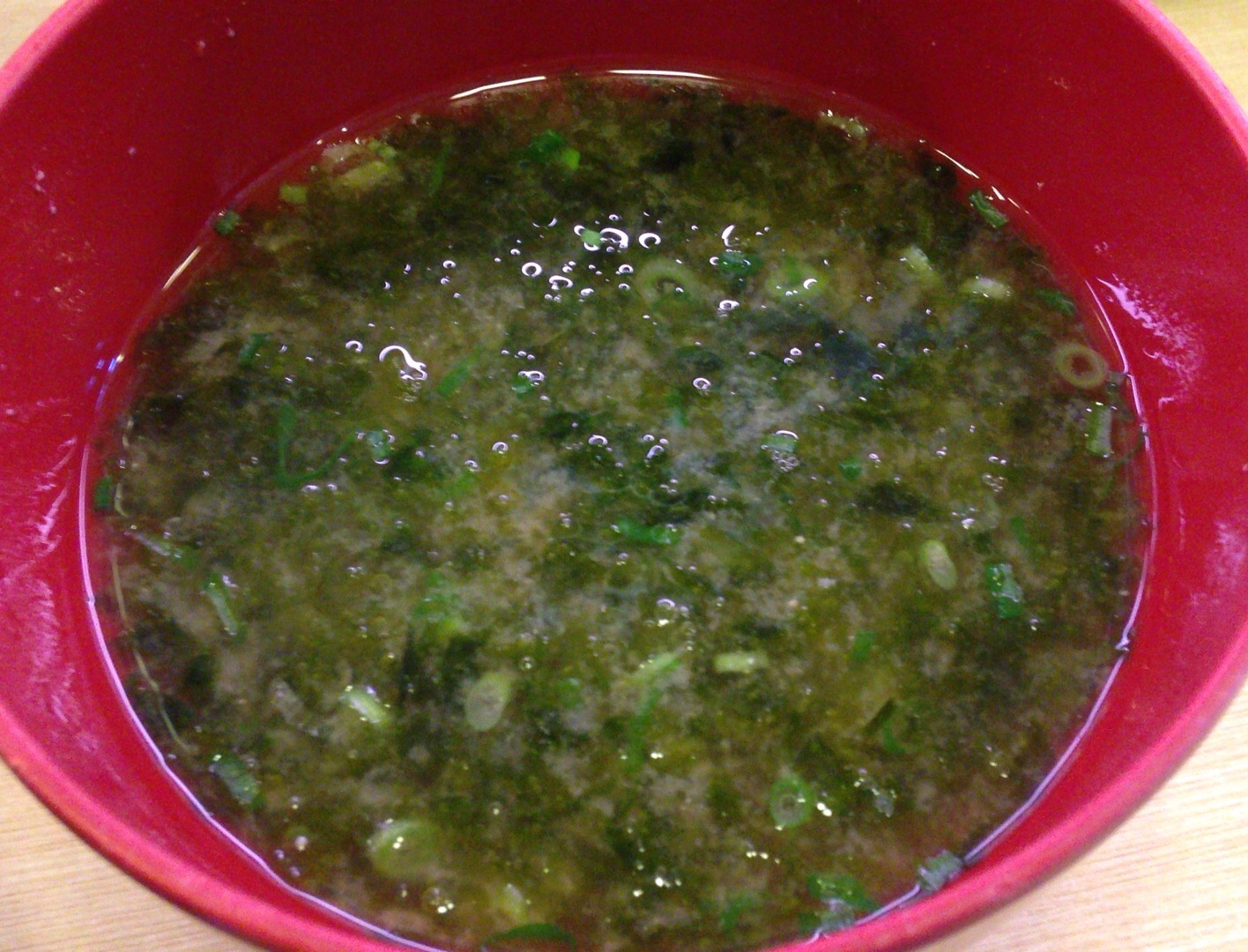 はま寿司のja:アオサ（ヒトエグサ）のja:味噌汁